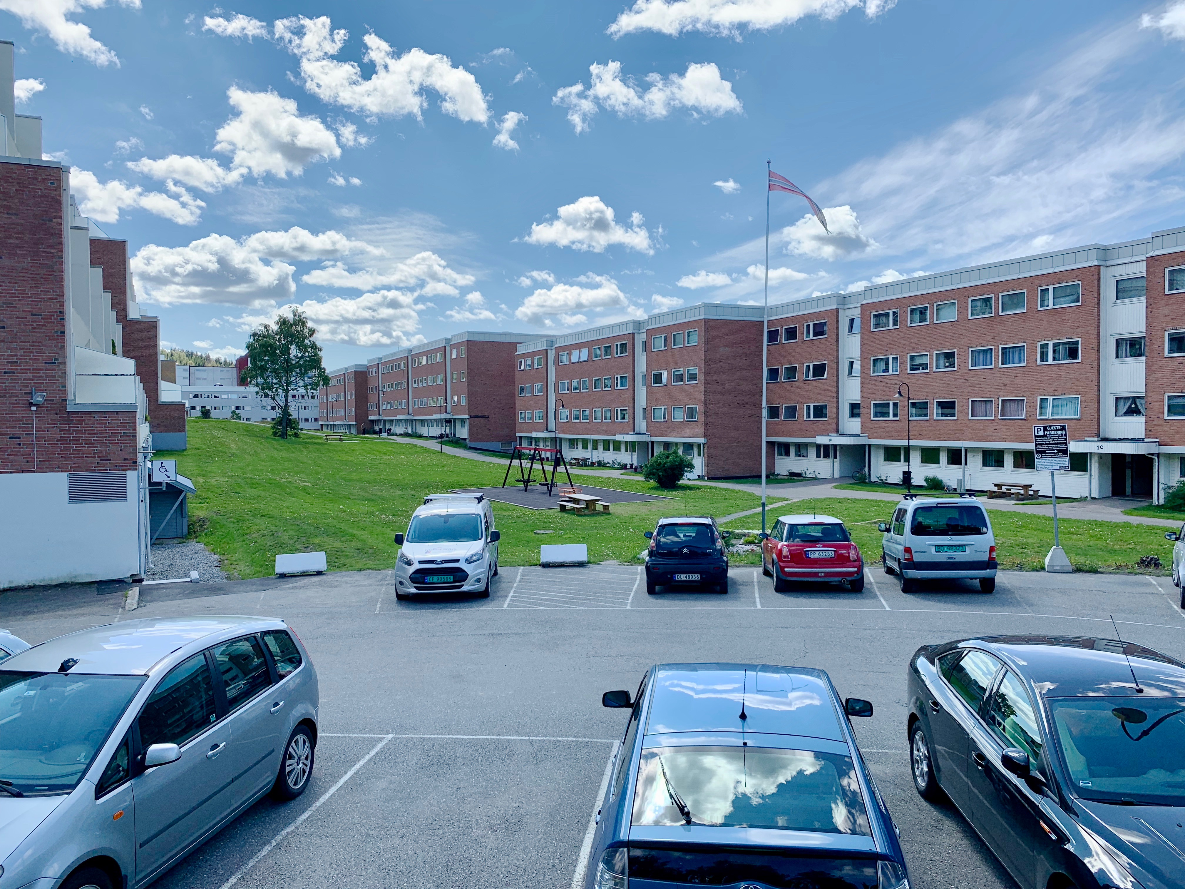 Elgtråkket. Blystadlia i Rælingen.